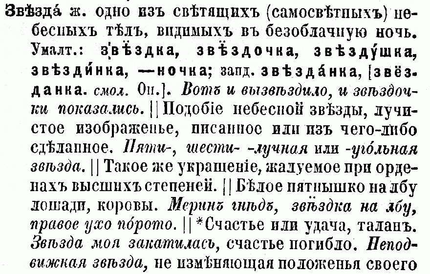 Начало статьи «звезда» в 3-м издании словаря Даля (т. 1, 1903). Использован знак «ять с двумя точками» в прямом и курсивном начертании.